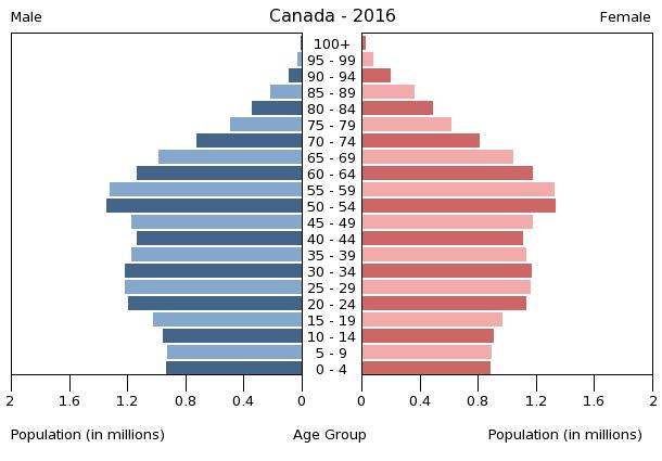 A population pyramid illustrates the age and sex structure of a country's population and may provide insights about political and social stability, as well as economic development. The population is distributed along the horizontal axis, with males shown on the left and females on the right. The male and female populations are broken down into 5-year age groups represented as horizontal bars along the vertical axis, with the youngest age groups at the bottom and the oldest at the top. The shape of the population pyramid gradually evolves over time based on fertility, mortality, and international migration trends.